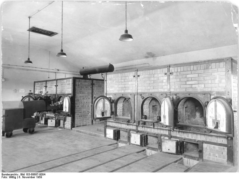 Gedenkstätte Buchenwald, Krematorium, Verbrennungsöfen Zentralbild Wittig Hl-Noa 6.11.1959 Aus dem ehemaligen KZ Buchenwald UBz: Blick auf die Verbrennungsöfen im Krematorium.